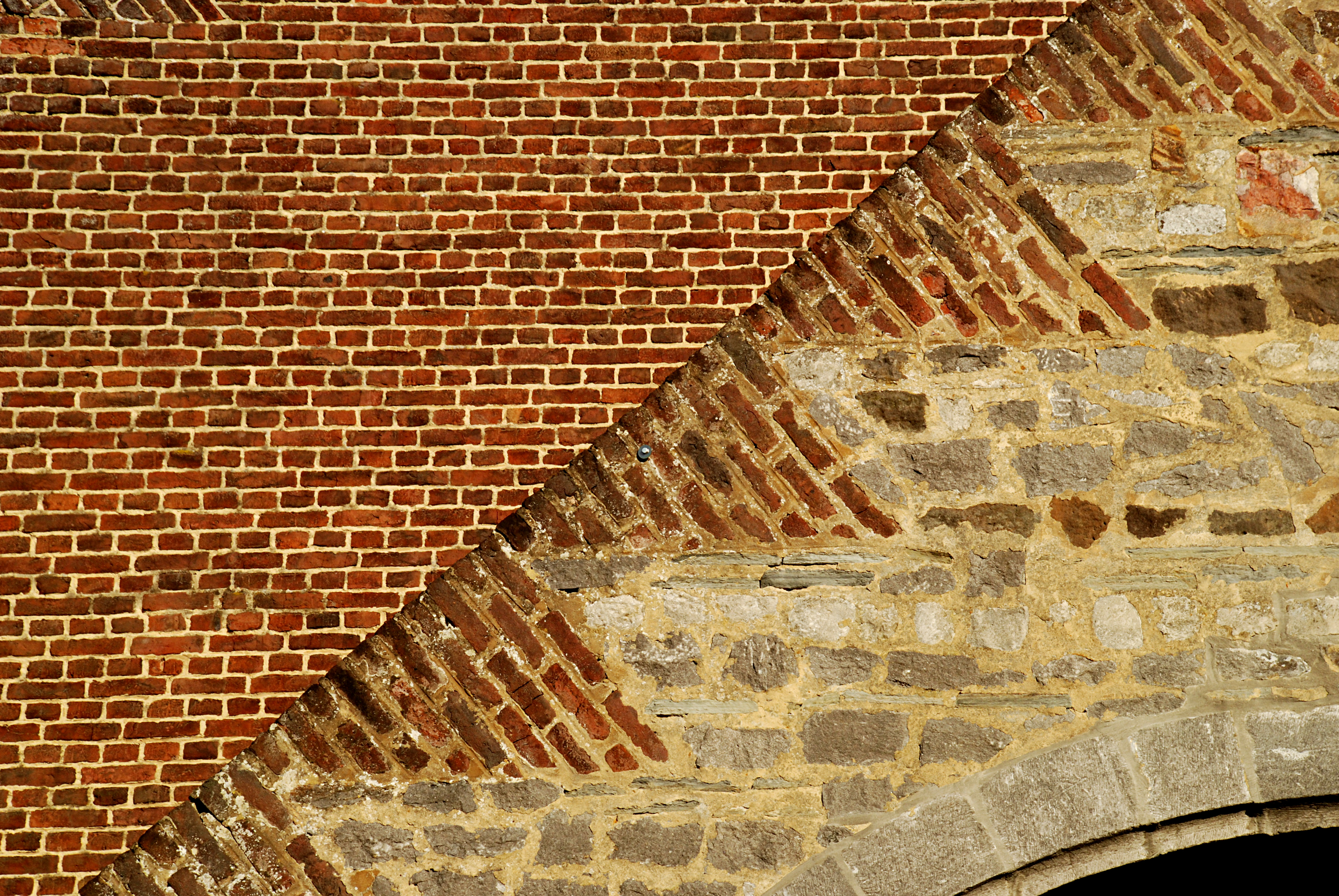 Belgique - Brabant wallon - Ottignies - Église Notre-Dame de Mousty